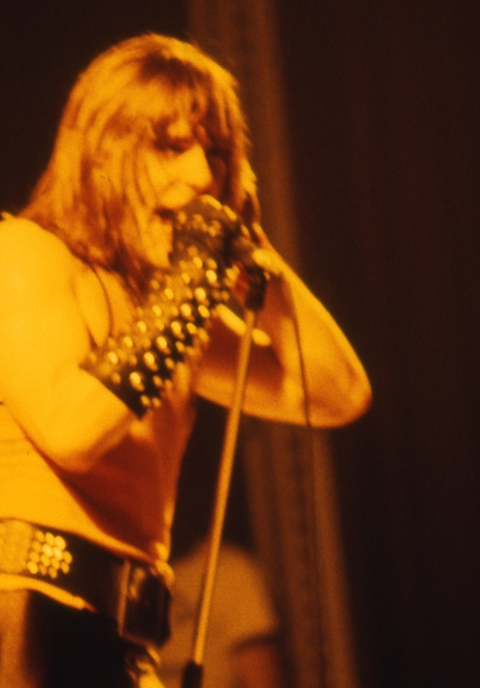 Bruce Dickinson Concierto celebrado el 4 de abril de 1982 en el Velódromo de Anoeta en San Sebastian